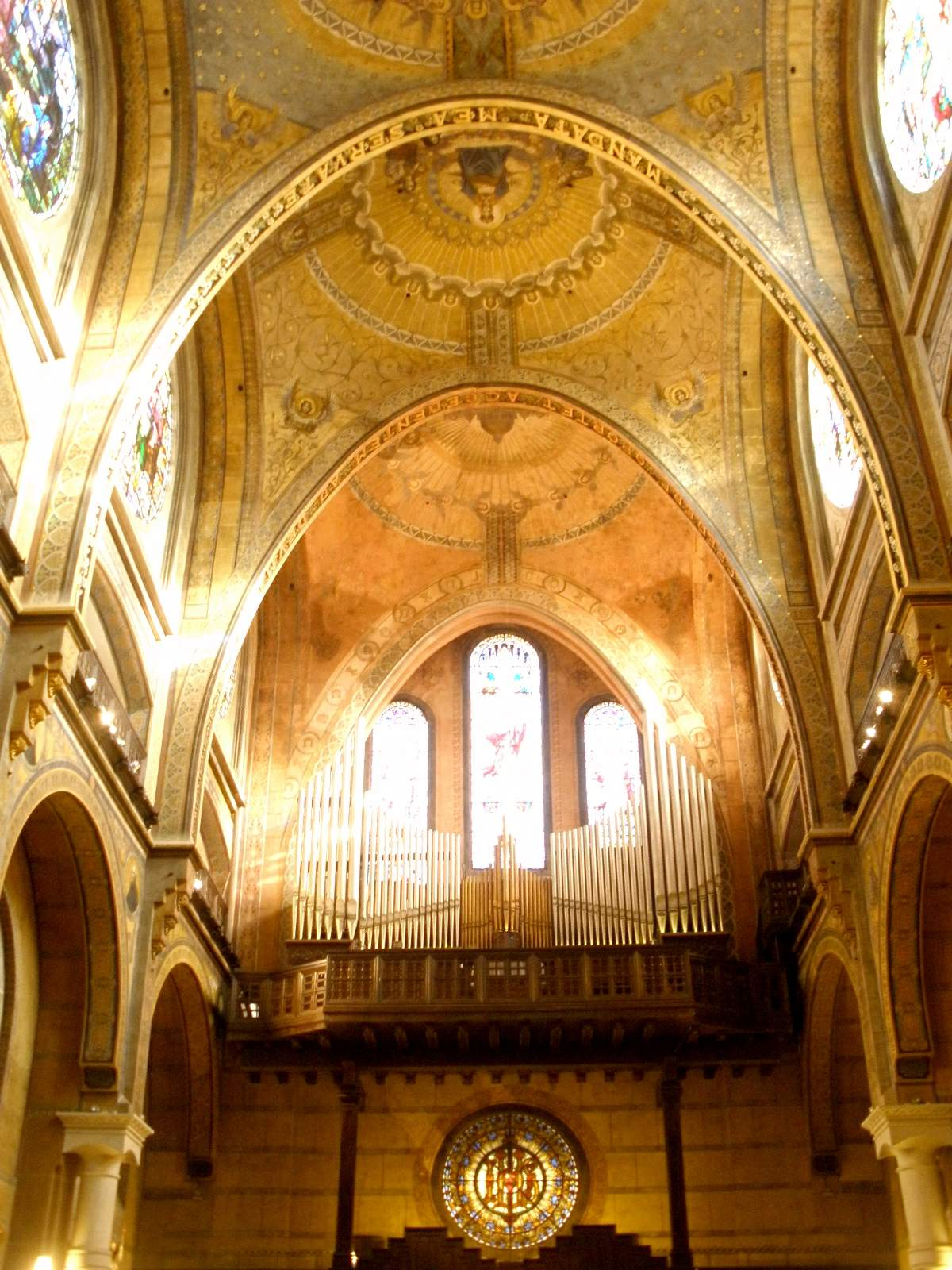 lica del Sagrado Corazón de Jesús (Gijón, Asturias)